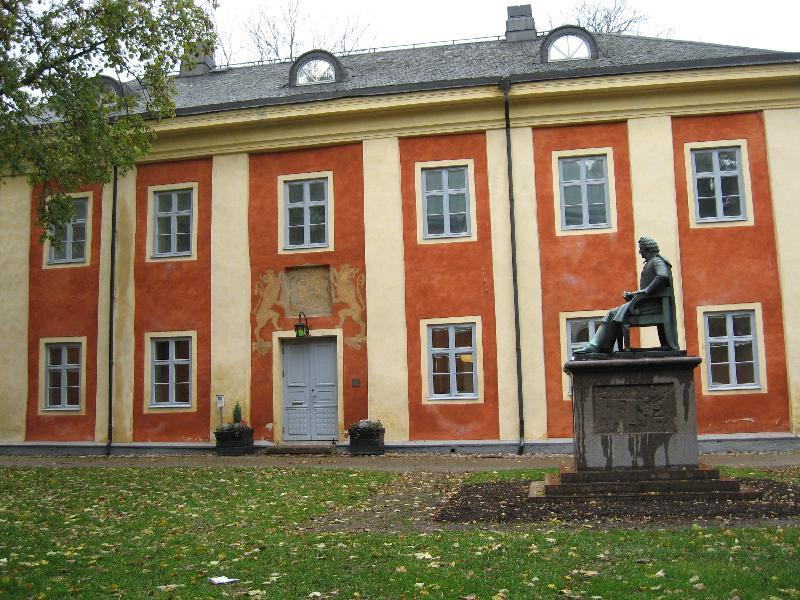 Karolinerhuset